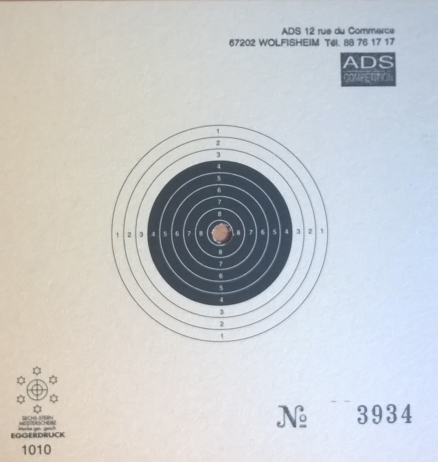 cible de carabine 10m avec un 10.